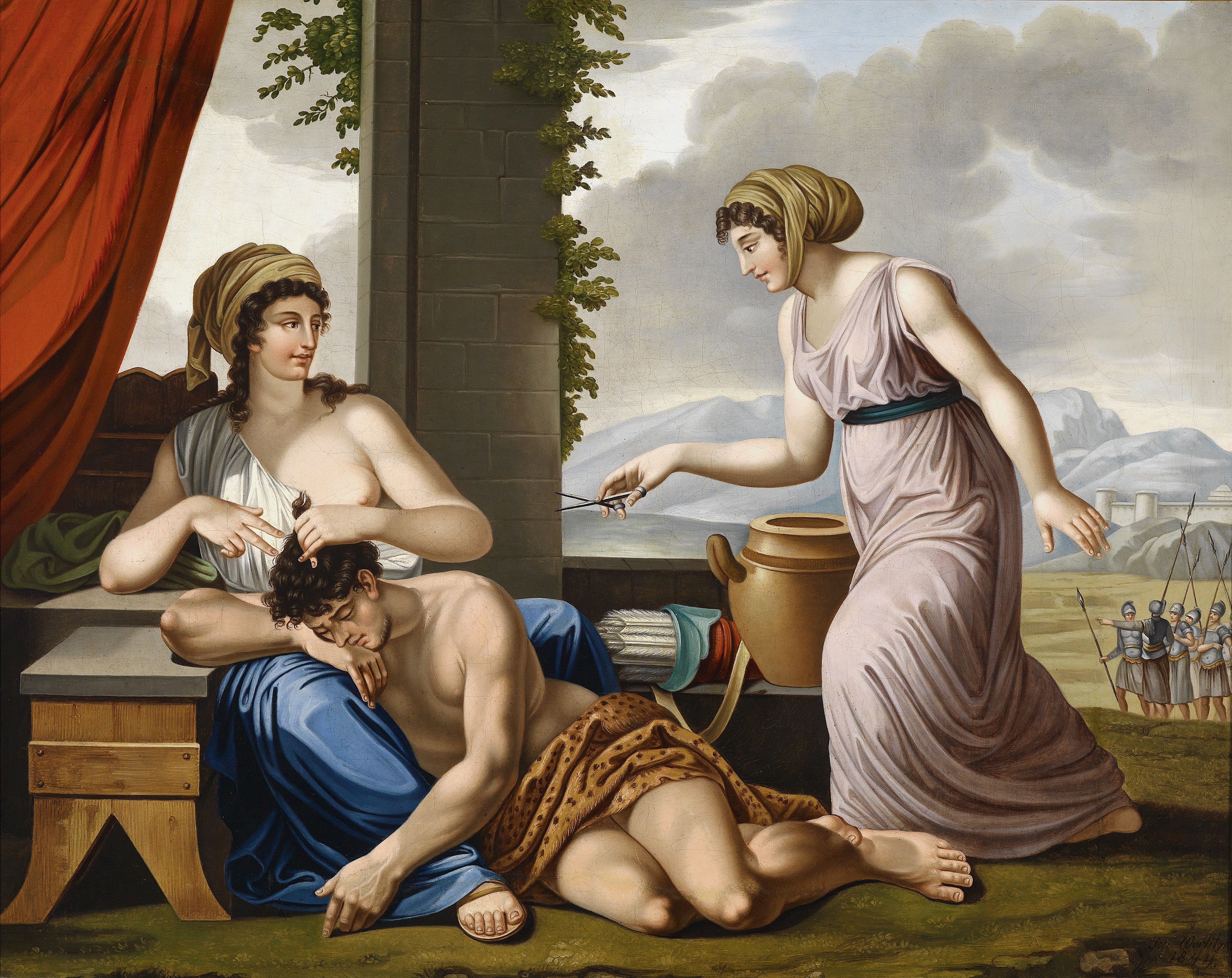 Samson und Delila, signiert und datiert Joh. Worlitzka 1844, Öl auf Leinwand, 70 x 88 cm, gerahmt